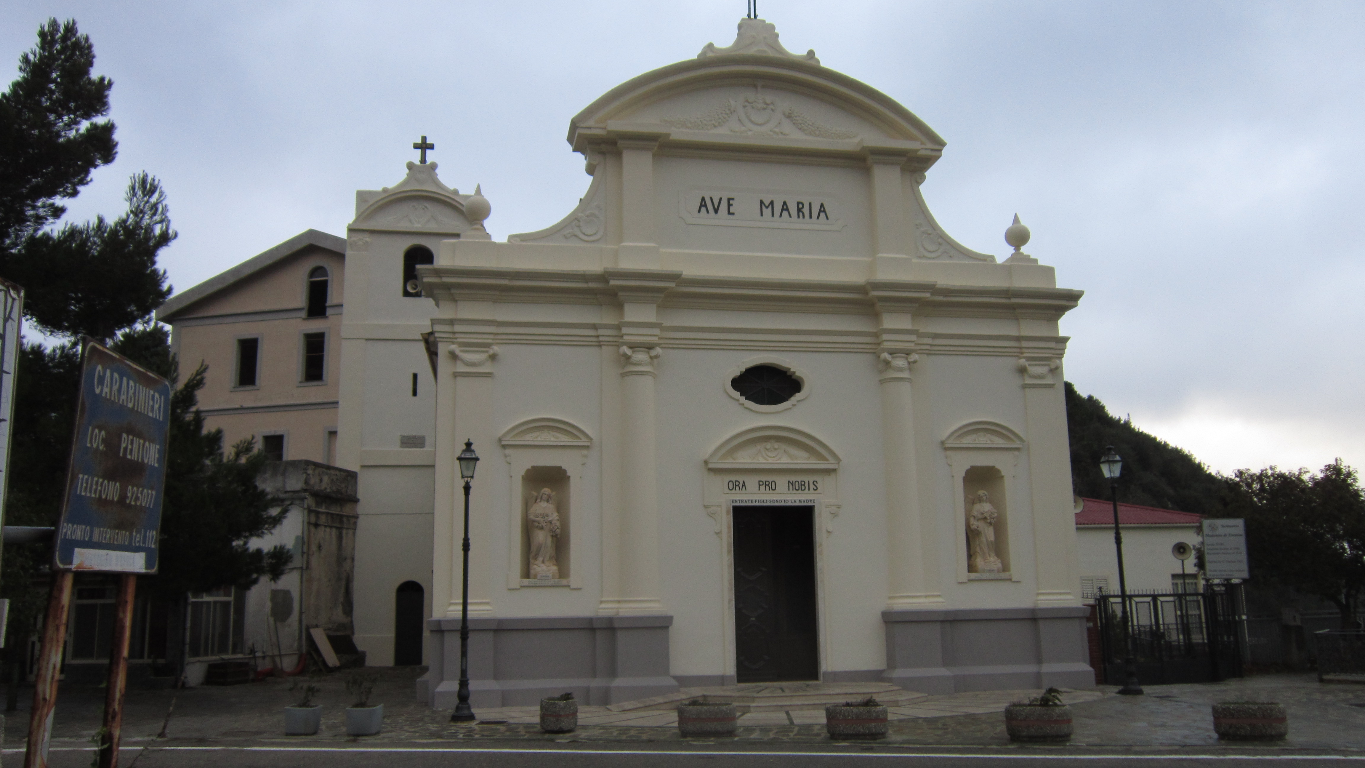 Santuario Madonna di Termini